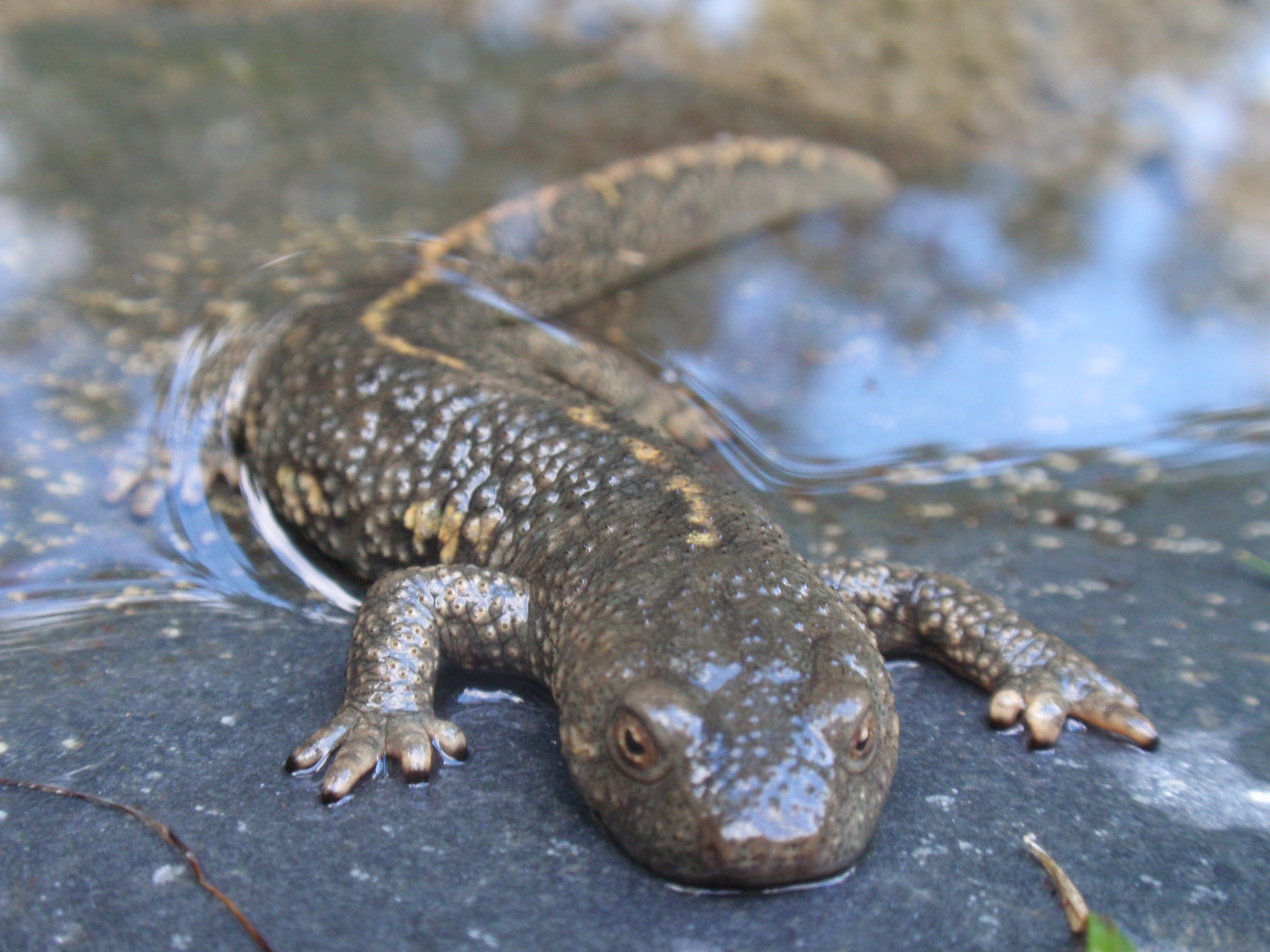 Tritó Pirinenc, (euproctus asper)